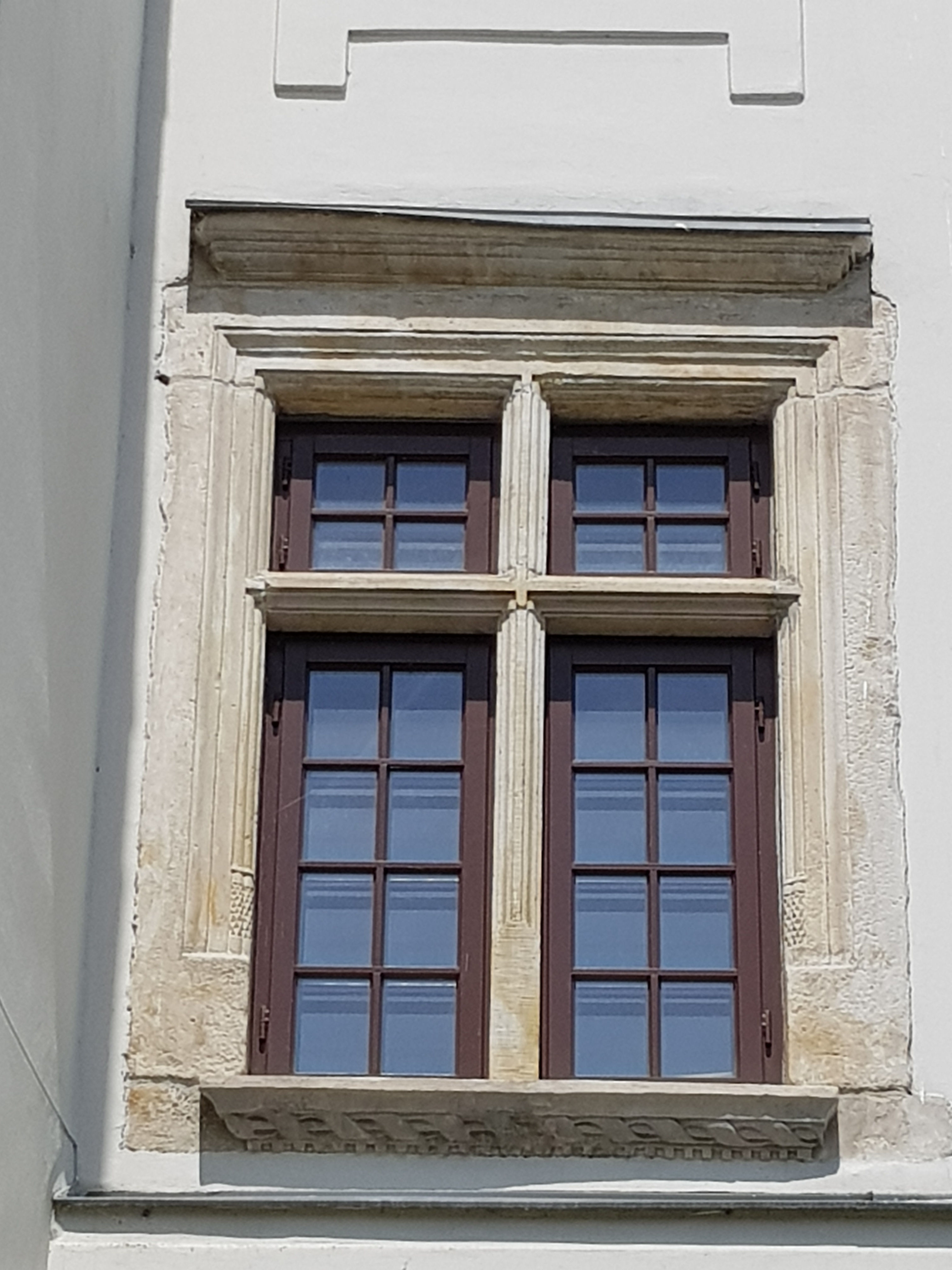 Obramienie okna